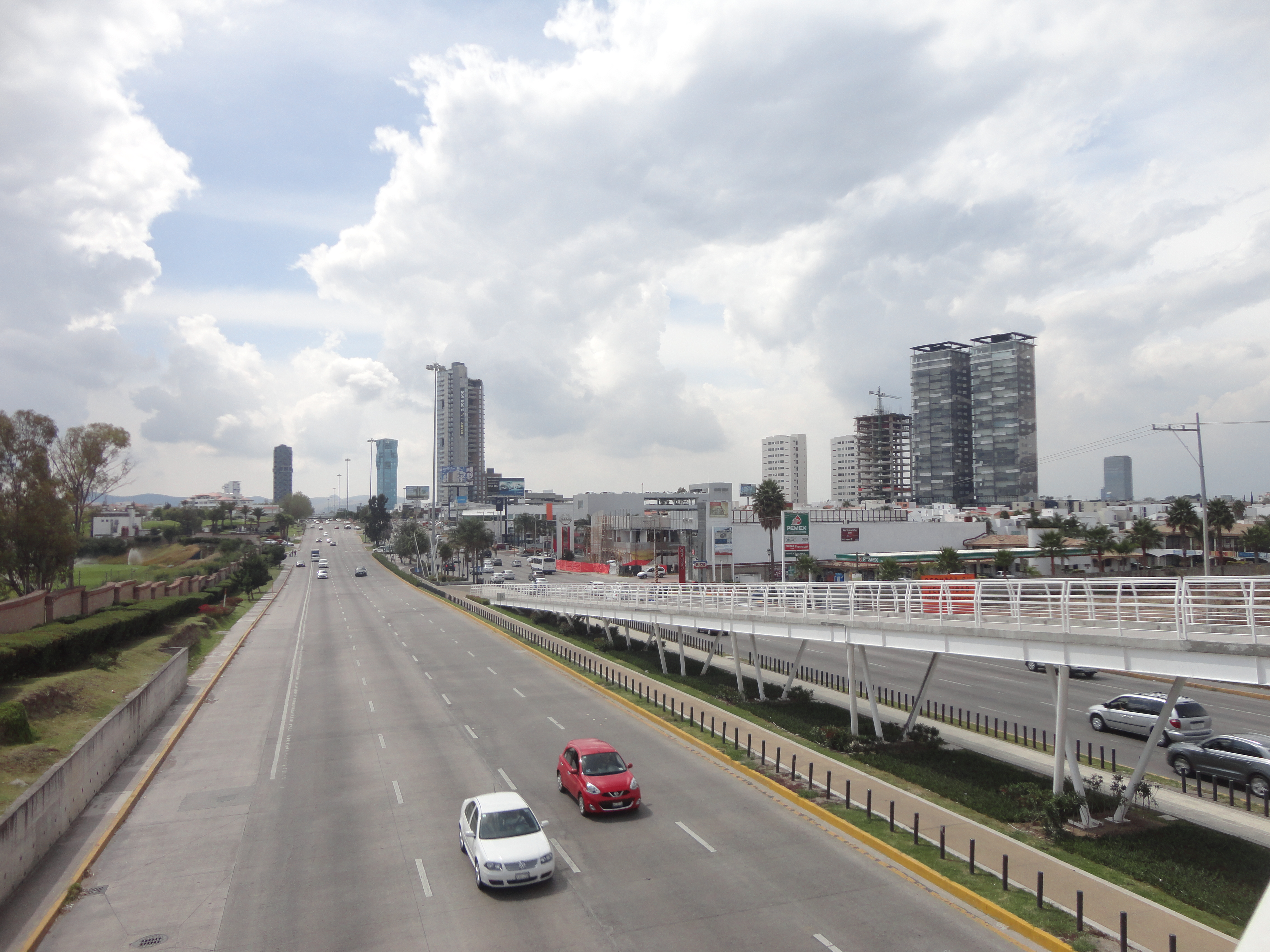 Vía Atlixcáyotl en Puebla de Zaragoza, México. Vista hacia Angelópolis.